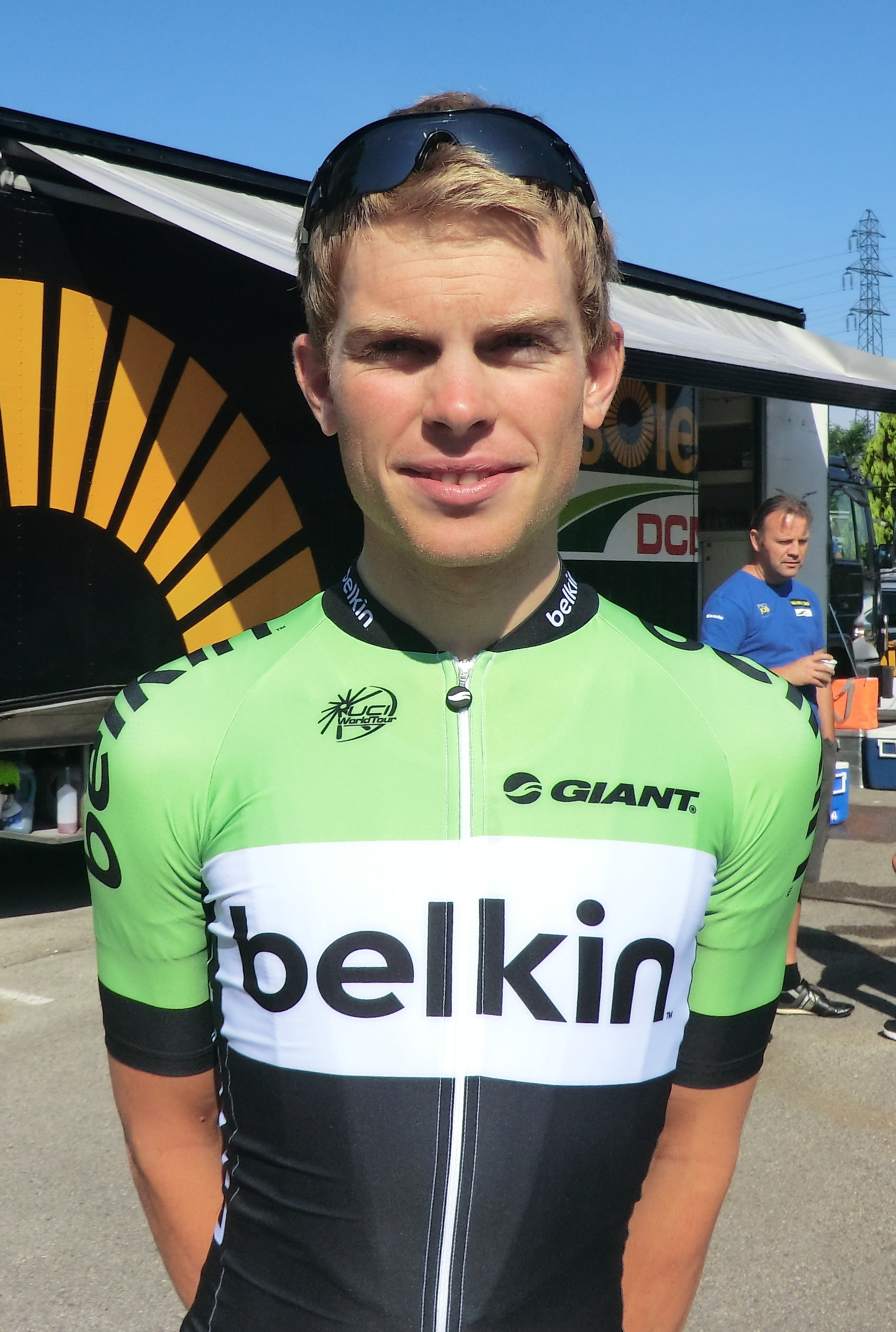 Coureurs à l'échauffement au matin du prologue du tour de l'Ain 2013, à l'hôtel Lyon-Est à Saint-Maurice-de-Beynost.